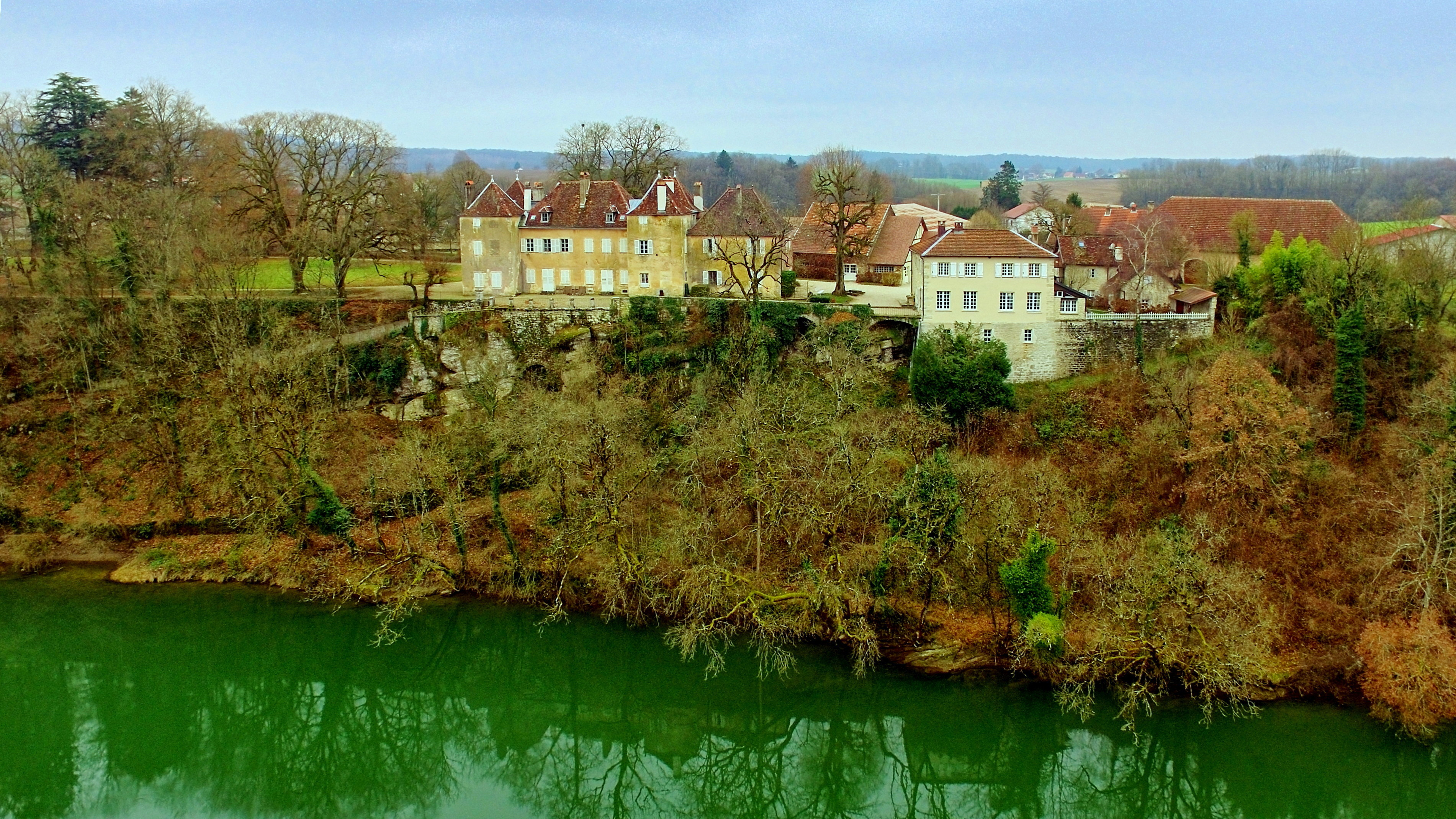 Le château au bord du Doubs